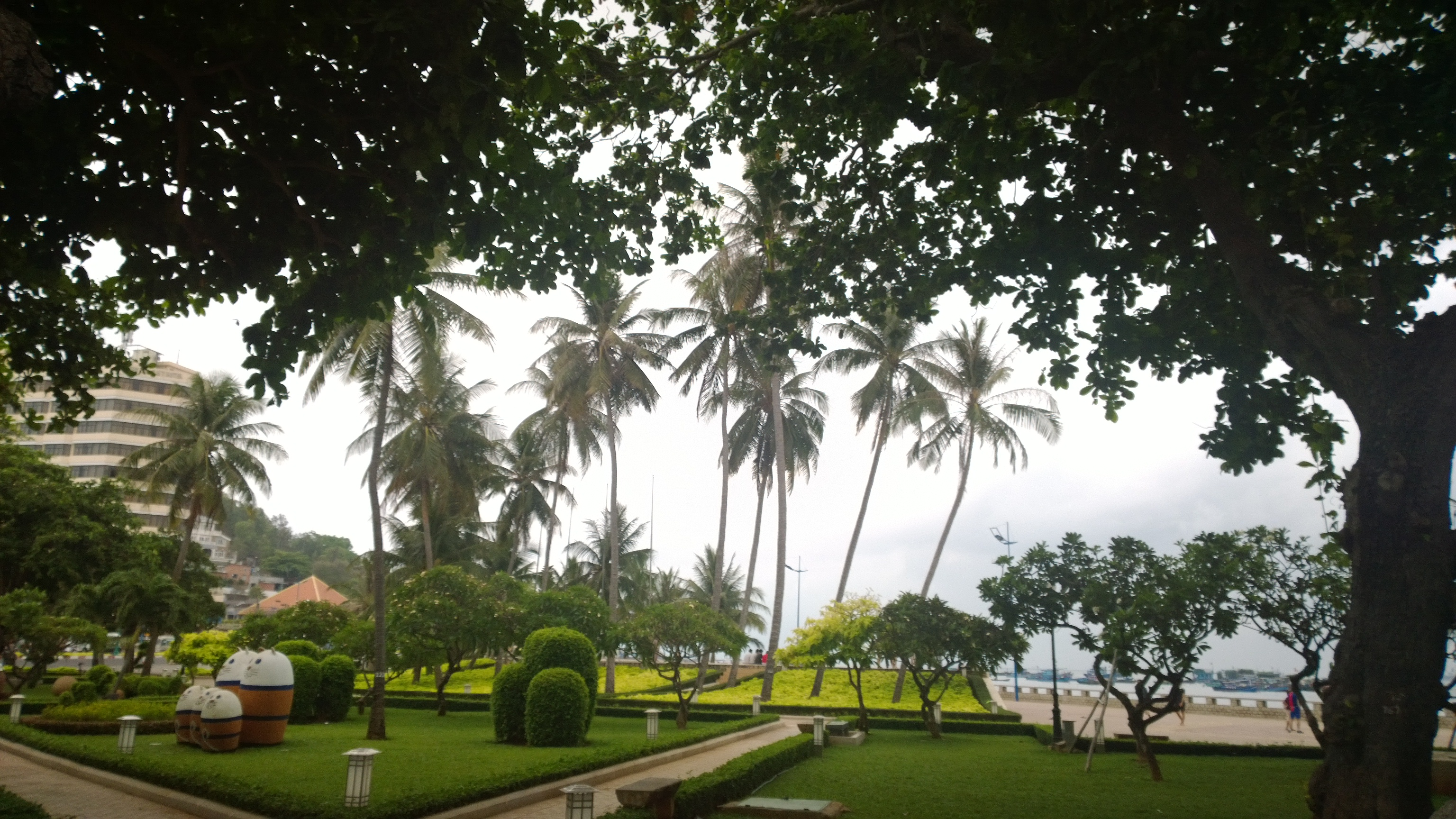 cong vien bai truoc-Phường 1, tp. Vũng Tàu, Bà Rịa - Vũng Tàu, Việt Nam